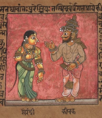 Kichaka cherchant à séduire Draupadi déguisée en Sairandhri (manuscrit indien du Karnakata, vers 1670)